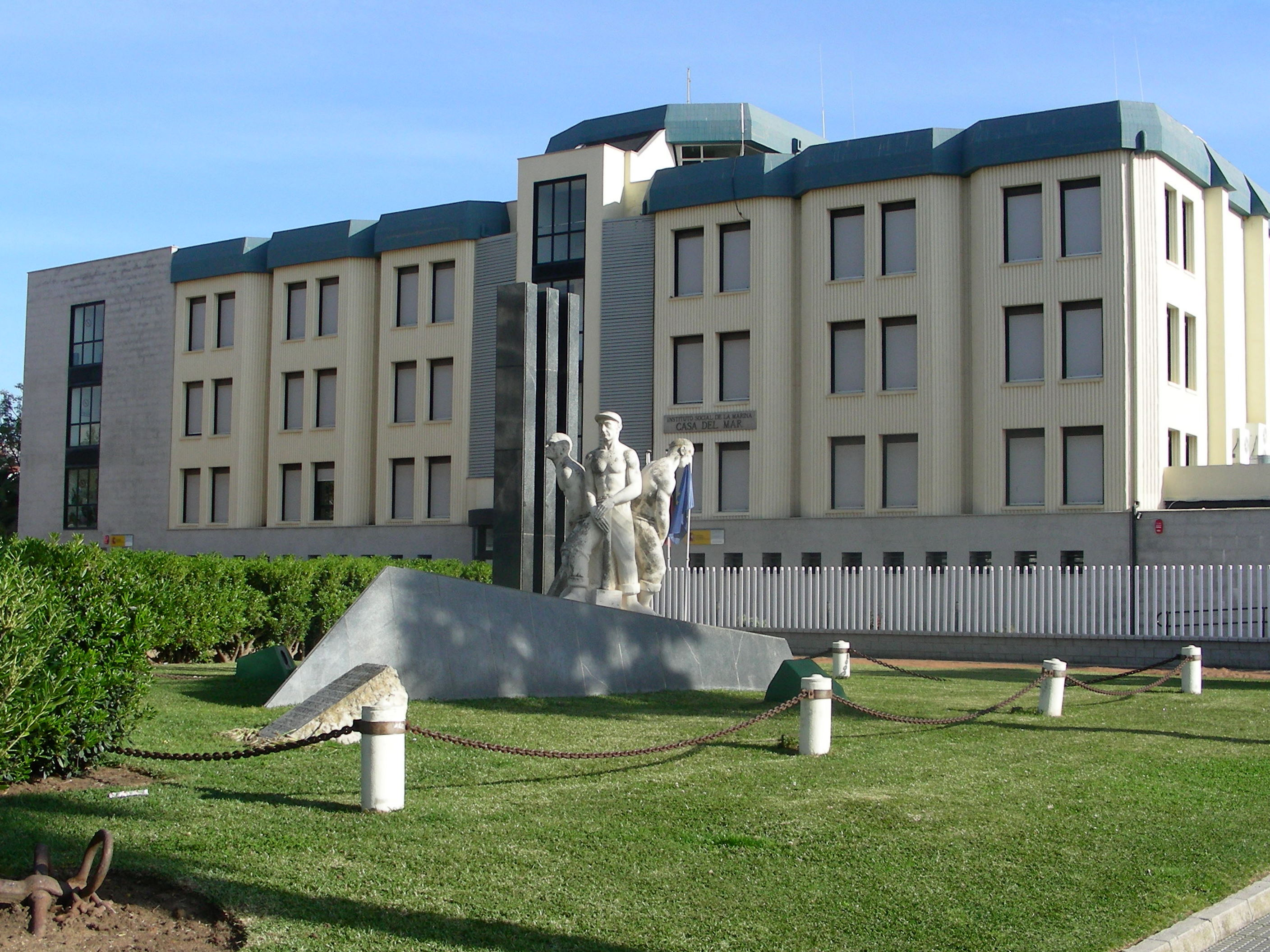 Instituto Social de la Marina-Cofradía de Pescadores de Isla Cristina